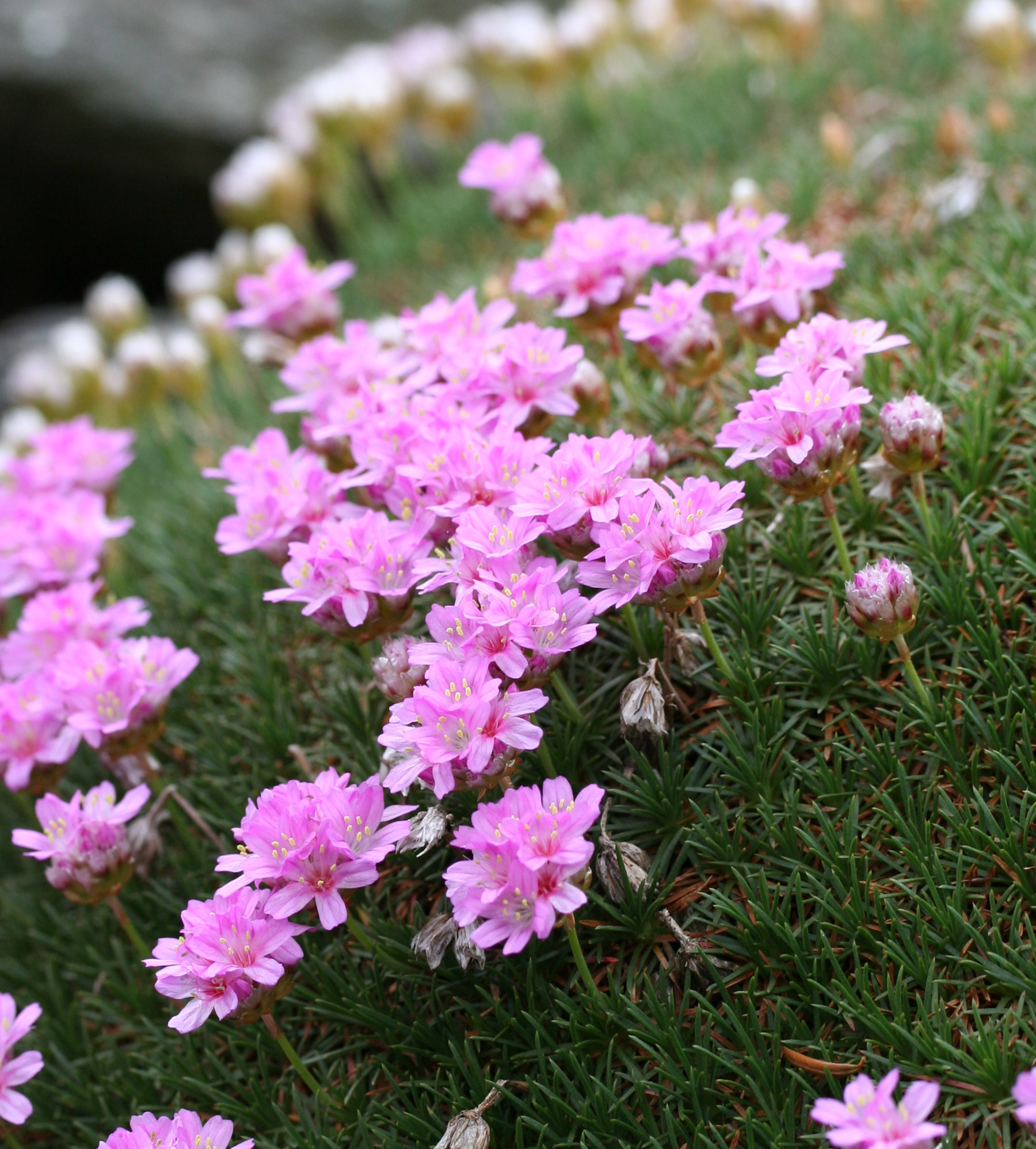 Armeria juniperifolia im Botanischen Garten Dresden